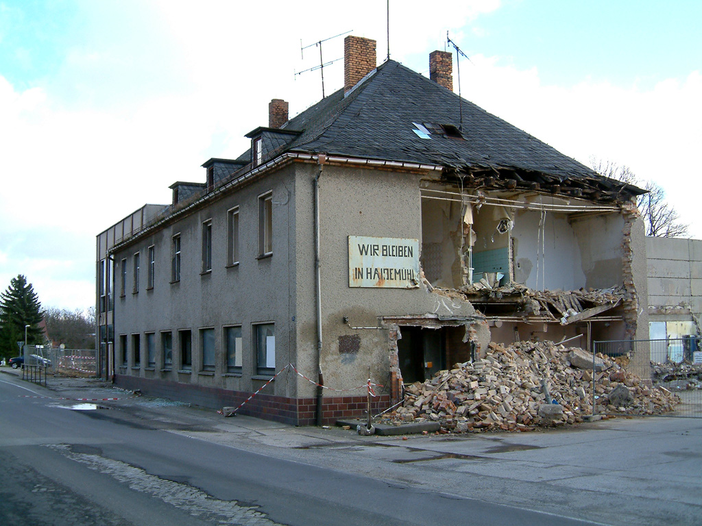 (Alt)-Haidemühl im Landkreis Spree Neiße im Land Brandenburg (ehem. Gasthaus Schötz, Hauptstraße)